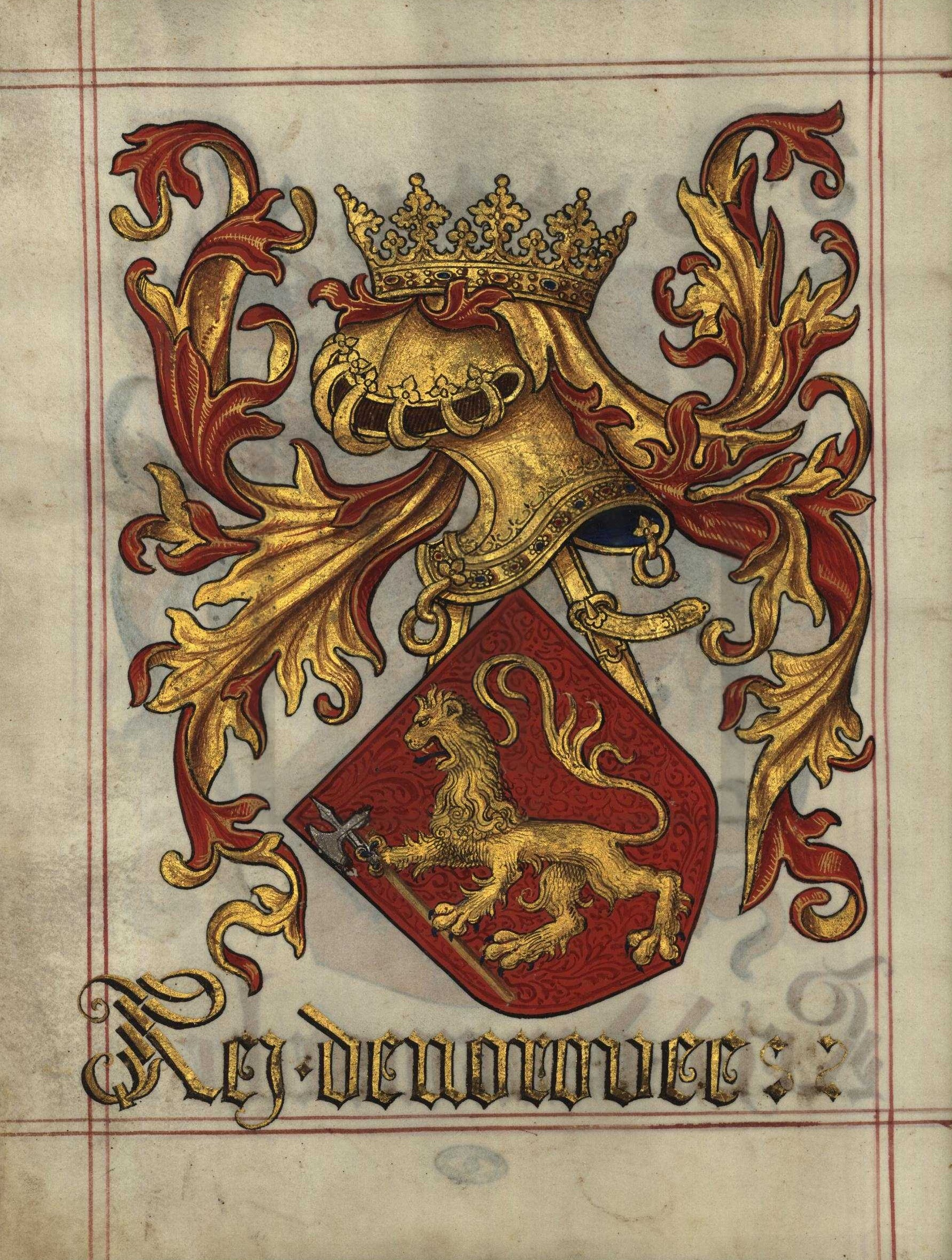 Livro do Armeiro-Mor, Armas do Rei da Noruega (fl 20v)